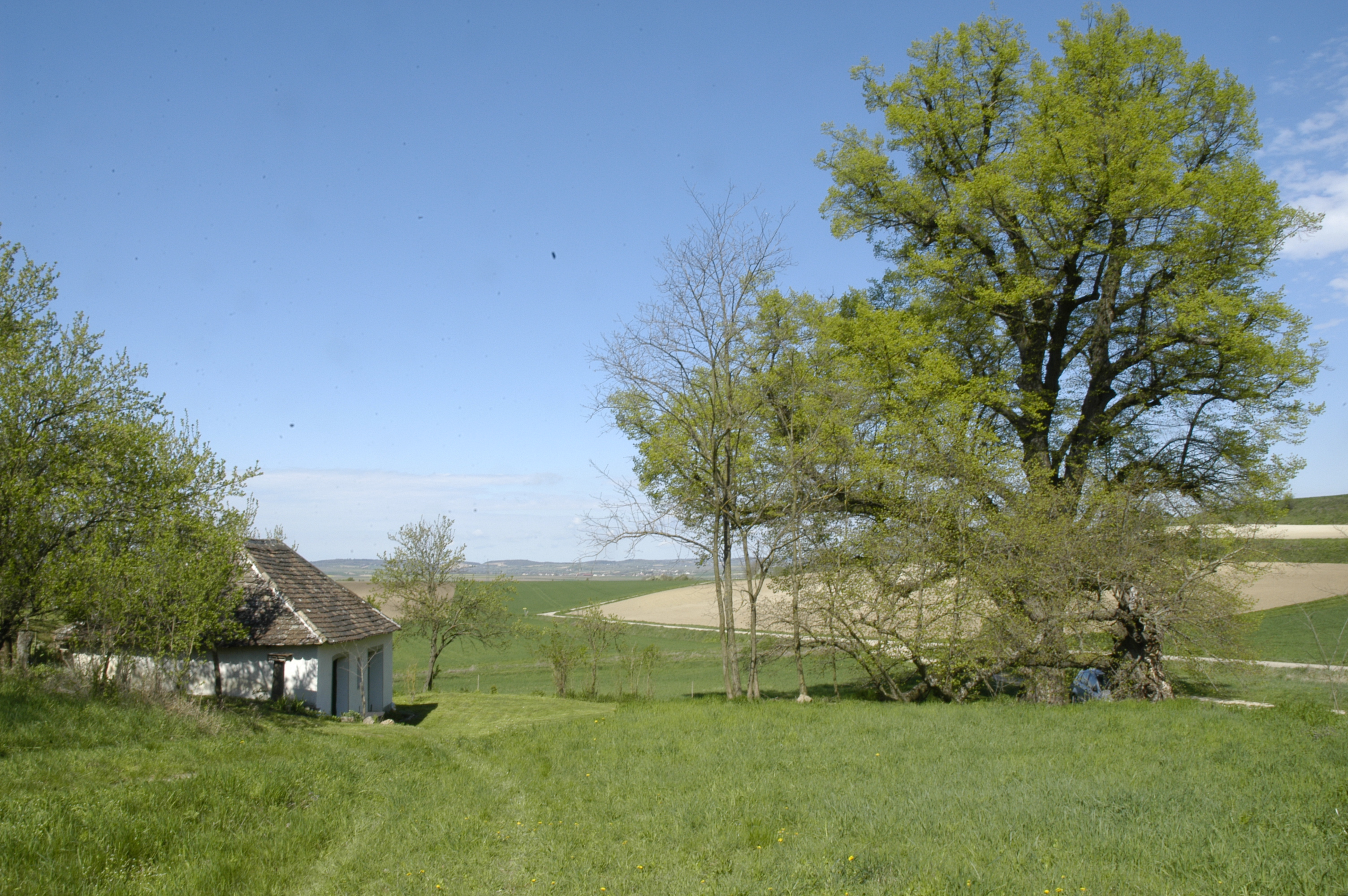 Keller bei den Linden This media shows the natural monument in Lower Austria with the ID HL-003.